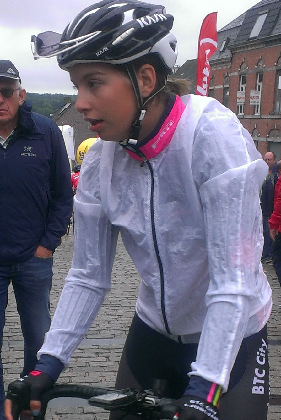 Start van de 3e en laatste etappe van de Lotto Belgium Tour 2017 in Geraardsbergen.